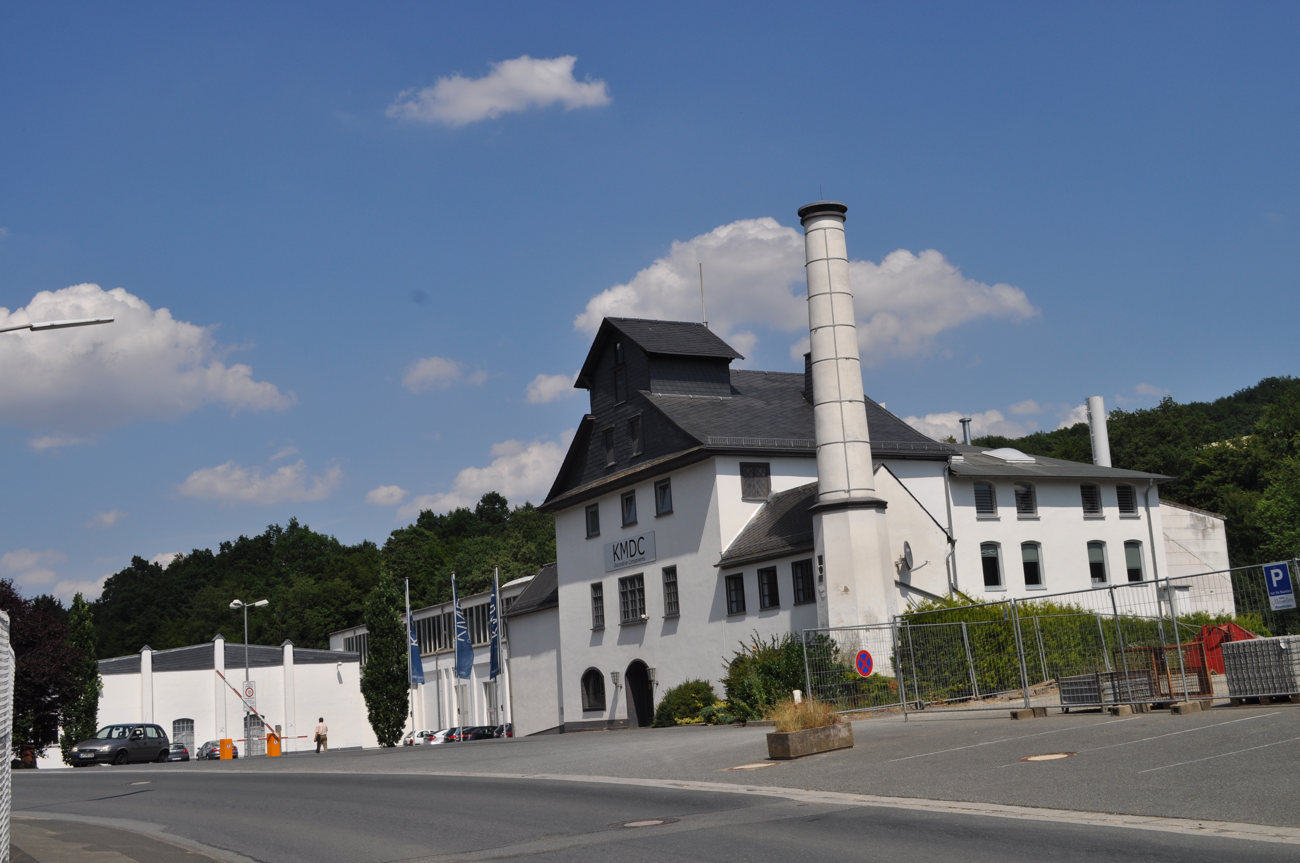 Audenschmiede, Weilmünster: Werk der KMDC, Teil der FREMACH-Gruppe. Der Schornstein, als eines der ältesten Teile des Werks wurde 1858 errichtet und 1911 sowie 1983 renoviert.